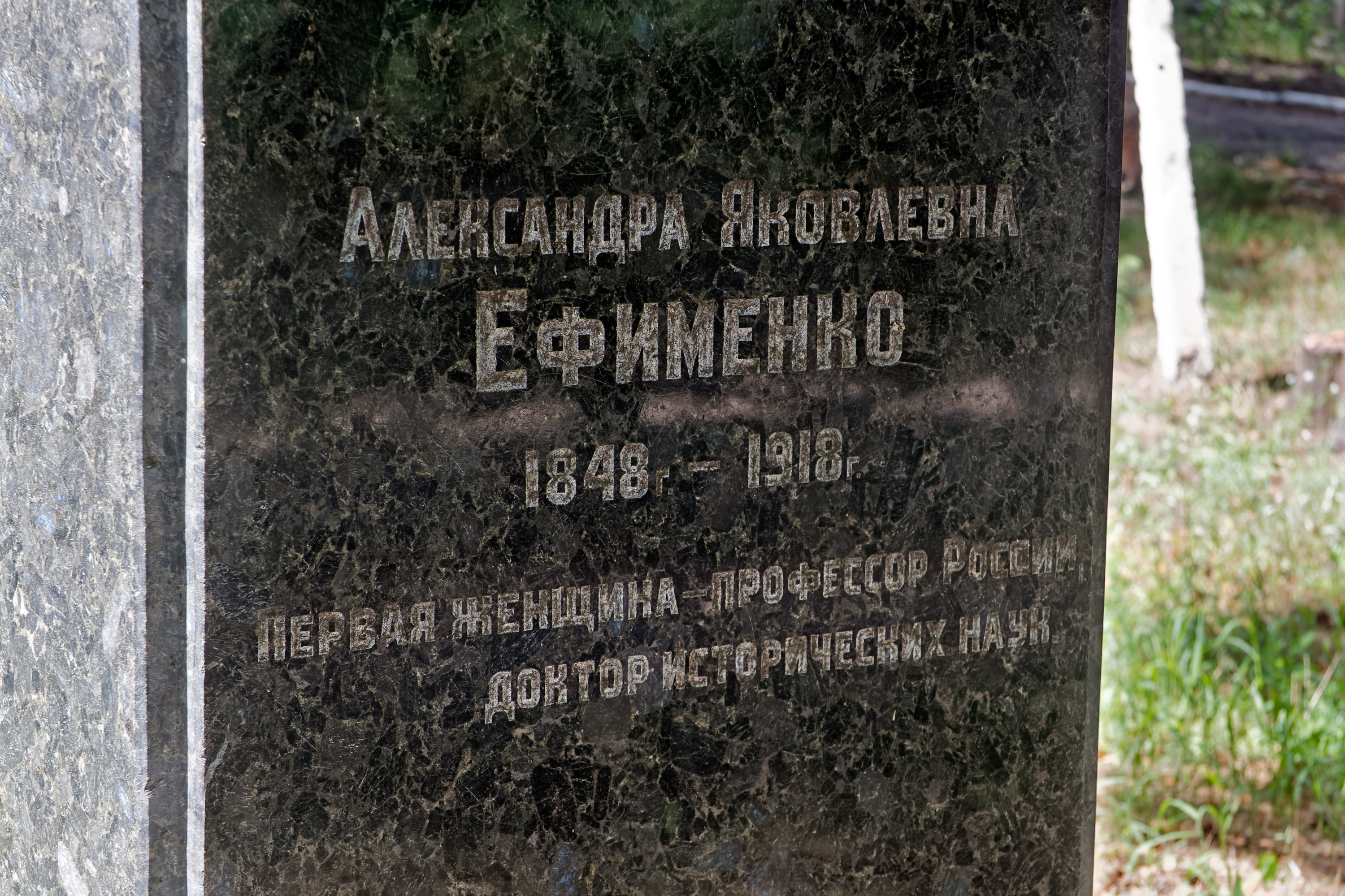 Бугаївка, Харківська область. Могила доктора історичних наук, професора Олександри Яківни Єфименко на території Бугаївської загальноосвітньої школи I - III ступенів.